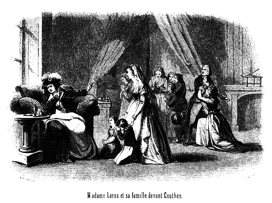 Madame Loras, mère de 11 enfants, suppliant Couthon de libérer son mari (qui sera guillotiné).